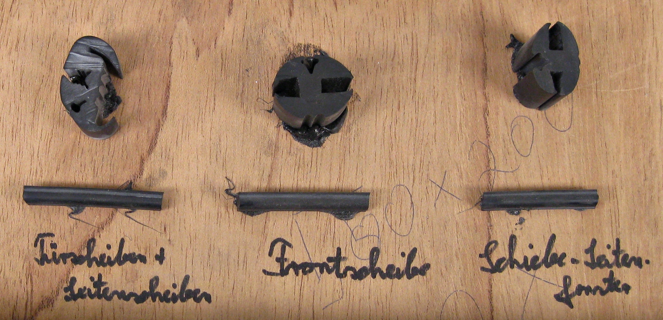 Bonn-Beuel, Werkstatt im Betriebshof der Stadtwerke Bonn/Busse und Bahnen (SWB): Ausschnitt einer Darstellung verschiedener Gummiprofile, die beim Einbau von Fensterscheiben in Strassenbahnen verwendet werden.